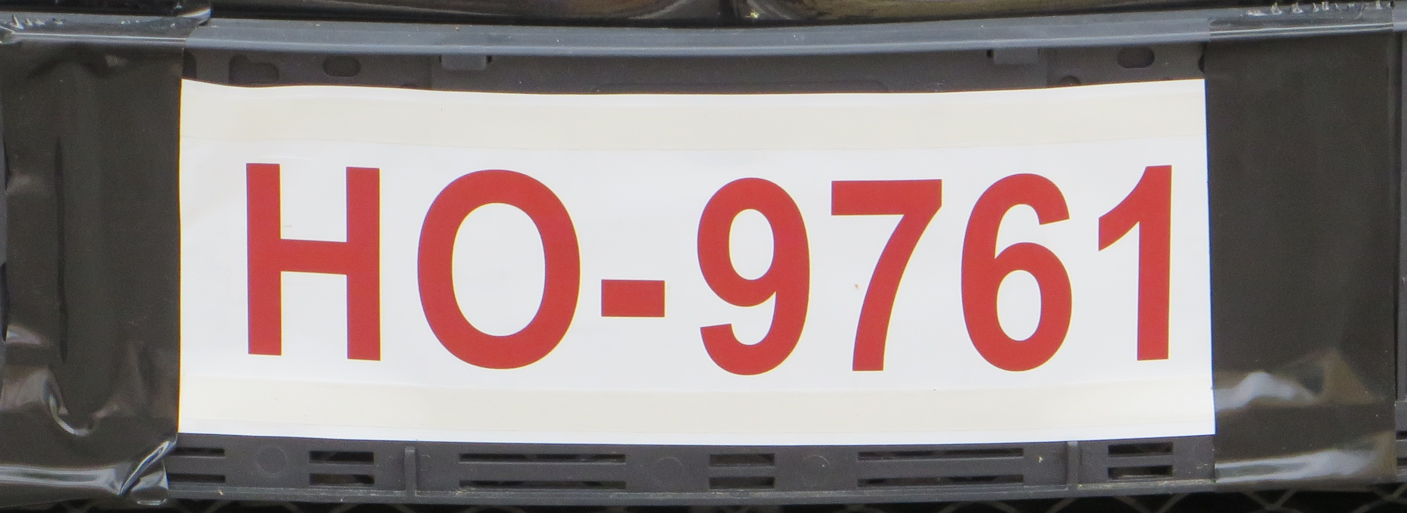 Tijdelijke kentekenplaat Finland